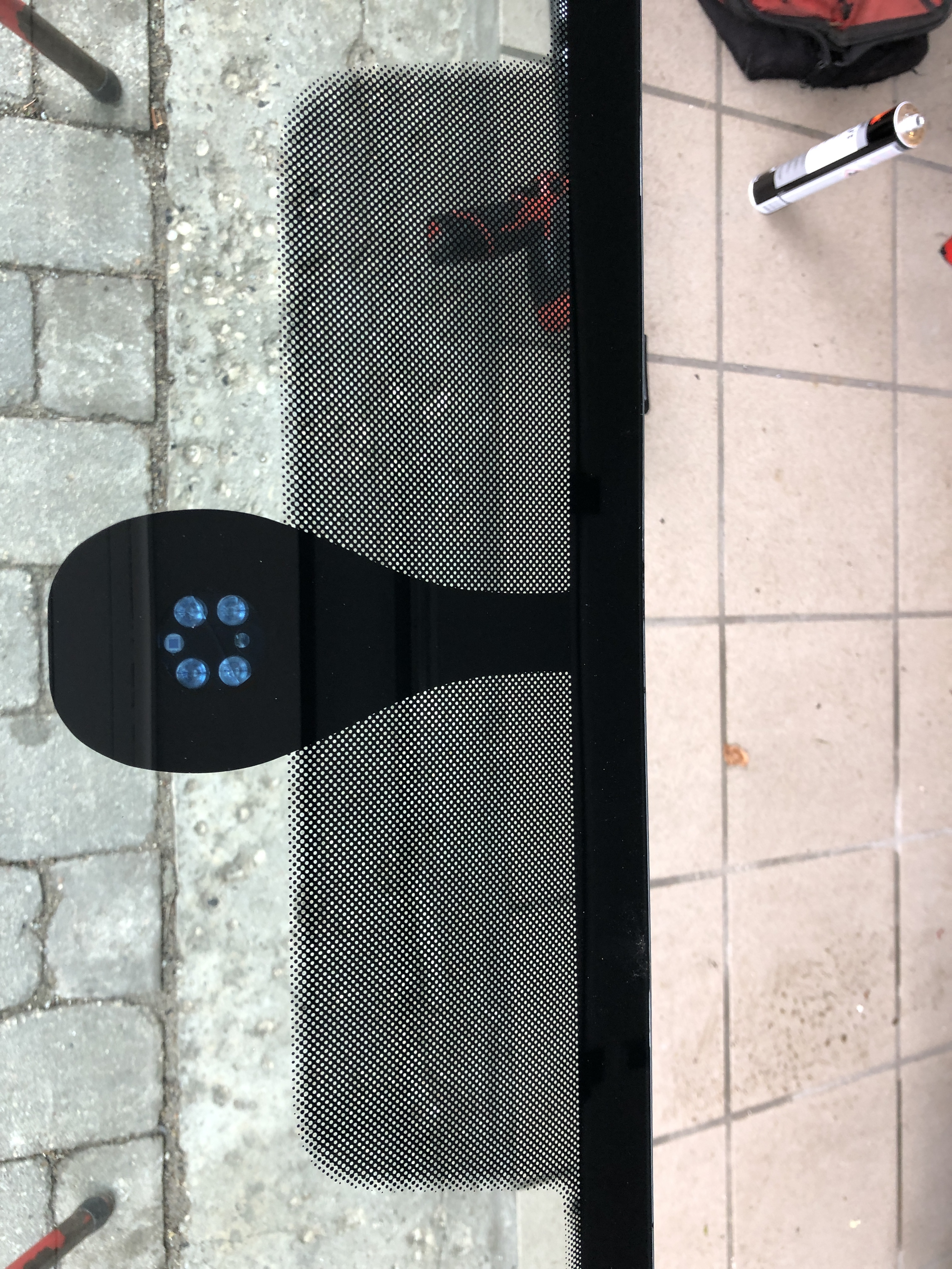 regnsensor og lyssensor